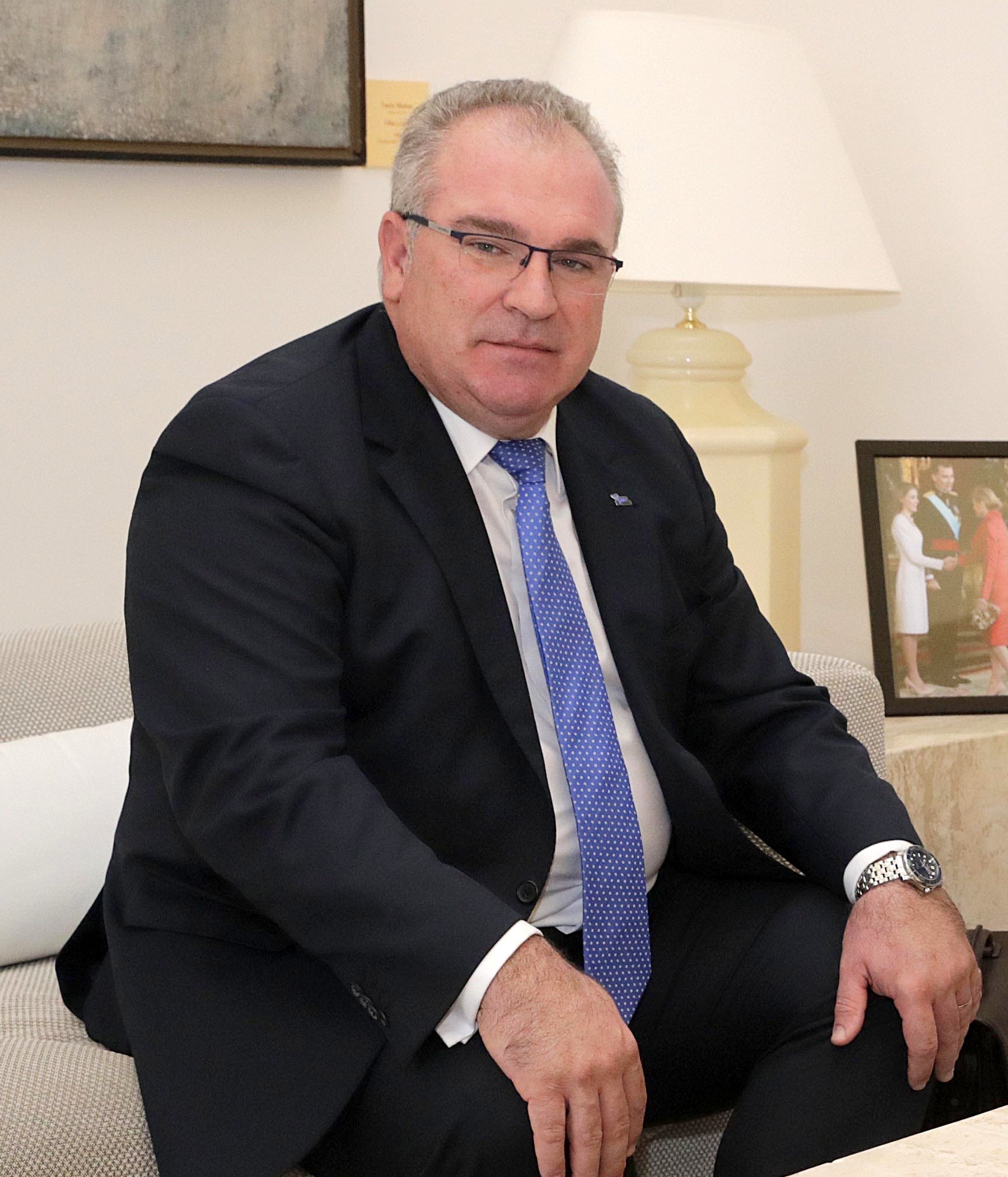 La presidenta de la Comunidad de Madrid, Cristina Cifuentes, se reúne con el presidente de la Asociación de Víctimas del Terrorismo (AVT), Alfonso Sánchez. Foto: D.Sinova / Comunidad de Madrid